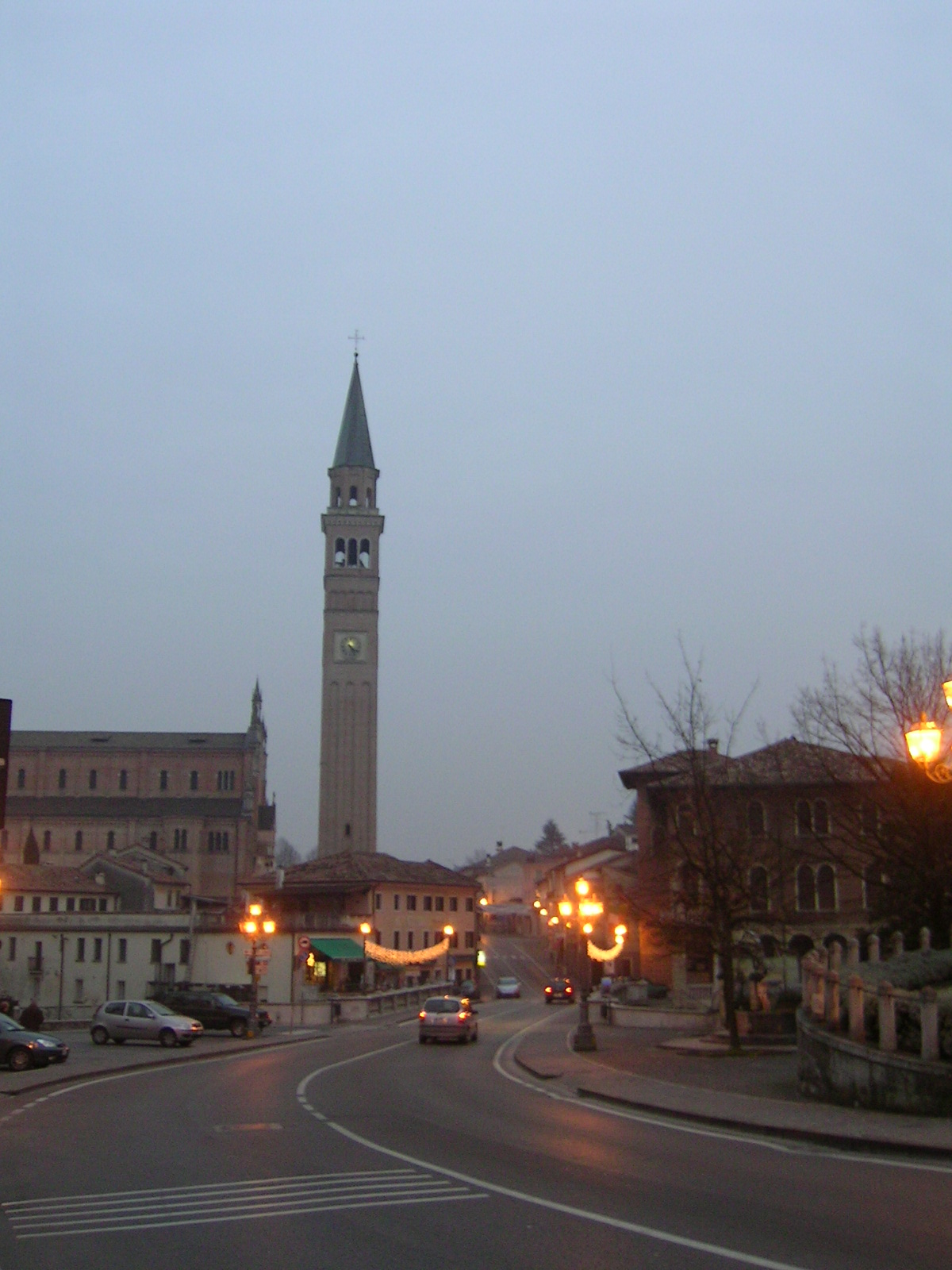 Il Campanile di Pieve di Soligo